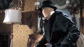 Screenshot dal film Sei donne per l'assassino di Mario Bava. Fonte Fonte